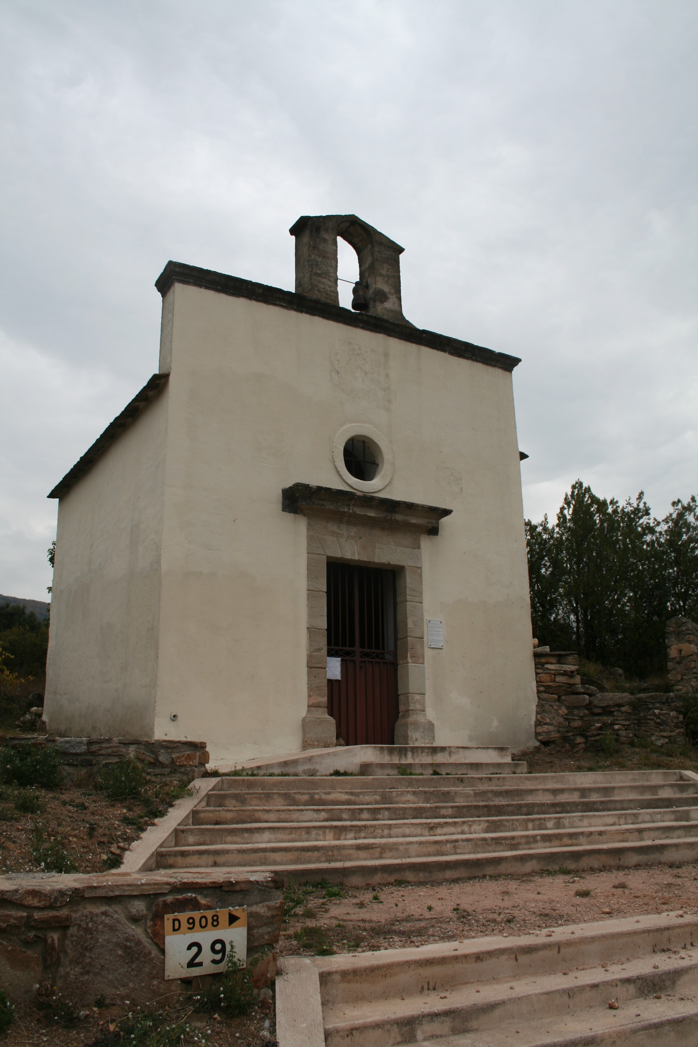 Colombières-sur-Orb (Hérault) - chapelle Sainte-Colombe.